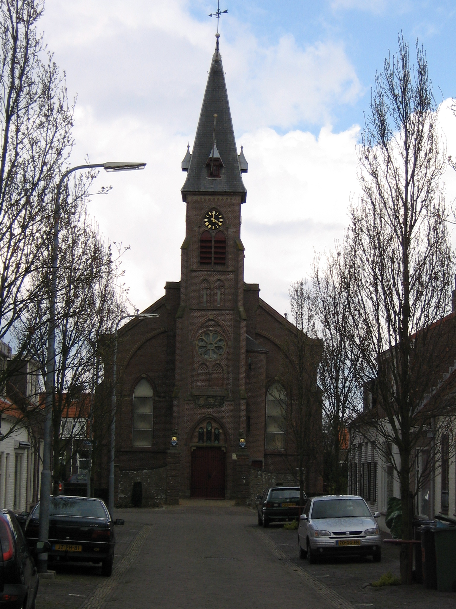 't Nieuweland: Durpskerke Nieuw- en Sint-Joosland, Zeeland: dorpskerk Nieuw- en Sint-Joosland, Middelburg community, NL: Church